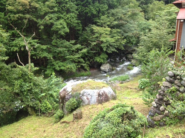 バス停「小中茶屋駅」付近の大丹波川の風景。